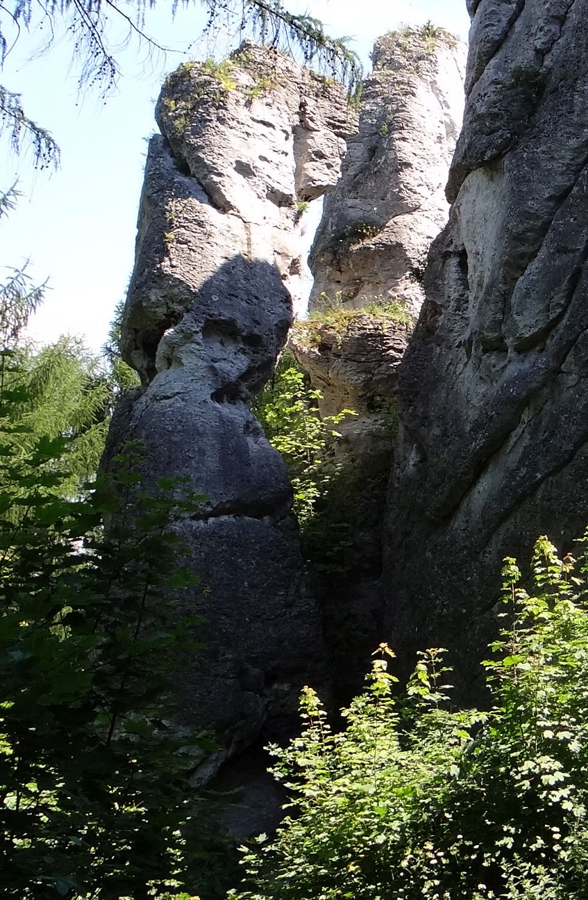 Skała Wielbłąd na Podzamczu